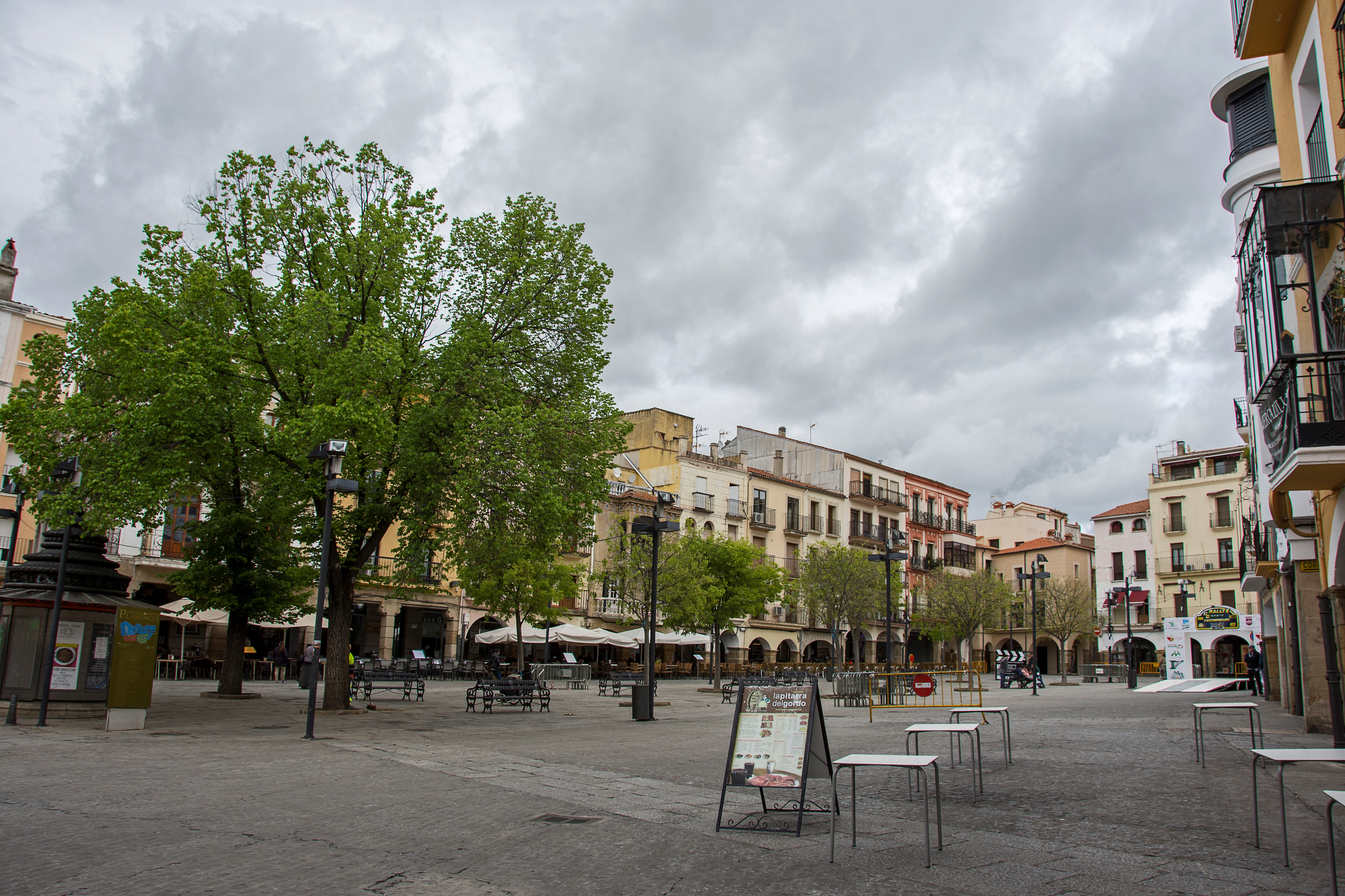 Plaza Mayor de Plasencia. Provincia de Cáceres, España